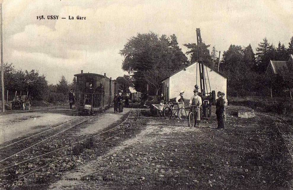 Gare des Chemins de fer du Calvados à Ussy, avec sa grue de déchargement pour les marchandises (pépinières d'Ussy)